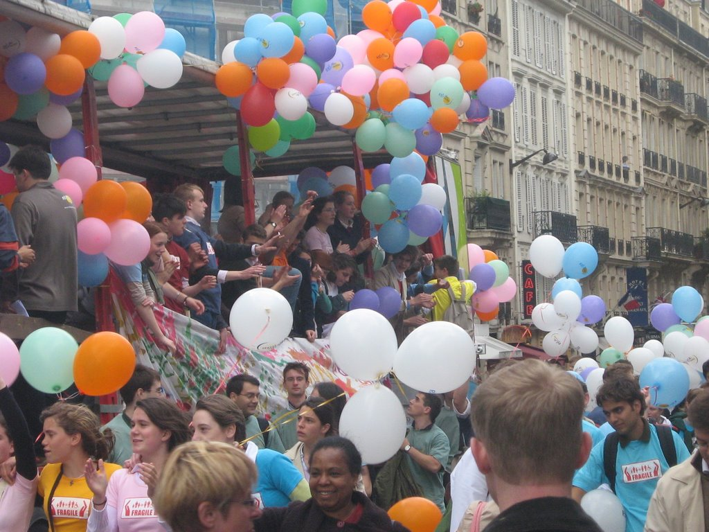 Live Parade à Paris le 20/05/2006